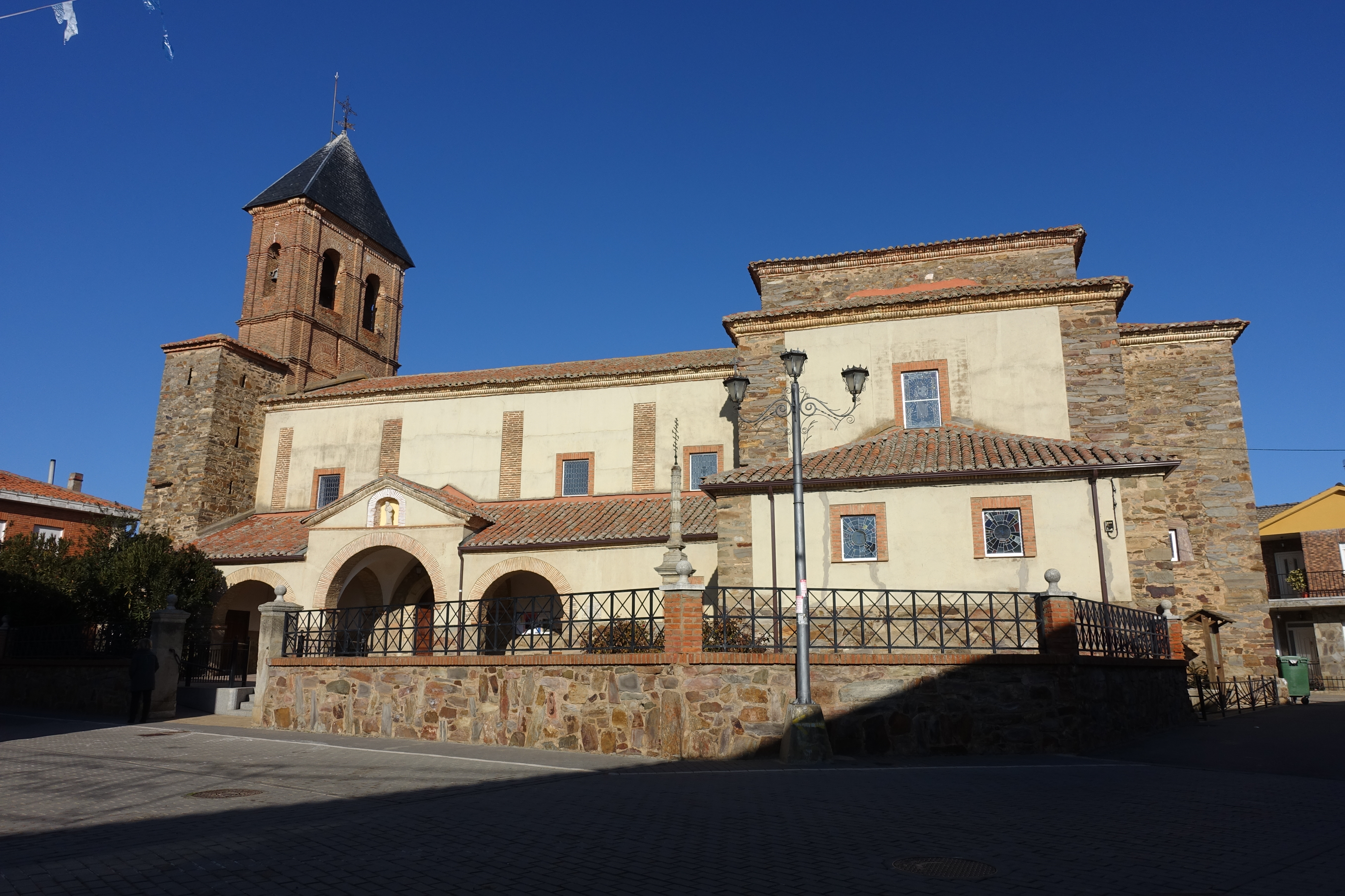 Iglesia de Santiago Apóstol, Villares de Órbigo (León, España).